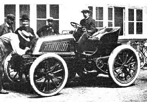 Alfred Levegh vainqueur de Paris-Toulouse-Paris 1900 sur Mors à pneus Michelin, Histoire de l'automobile, Pierre Souvestre, éd. H. Dunod et E. Pinat, 1907 (ASIN B001BPBE58) p.484 (reprise d'une photographie de Motor Review)